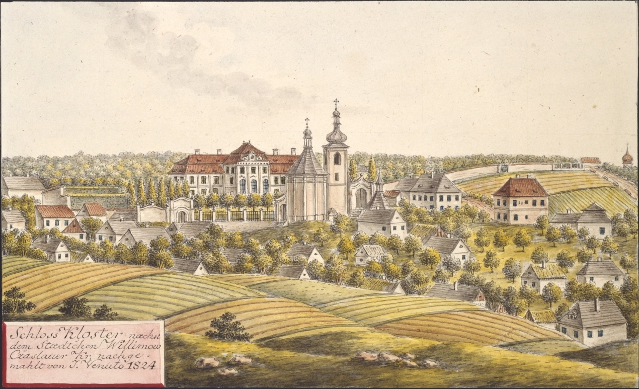 Zámek Klášter v městysu Vilémov u Golčova Jeníkova. Schloss Kloster naechst dem Staedtchen Willimow Czaslauer Kr. nachgemahlt von J. Venuto 1824